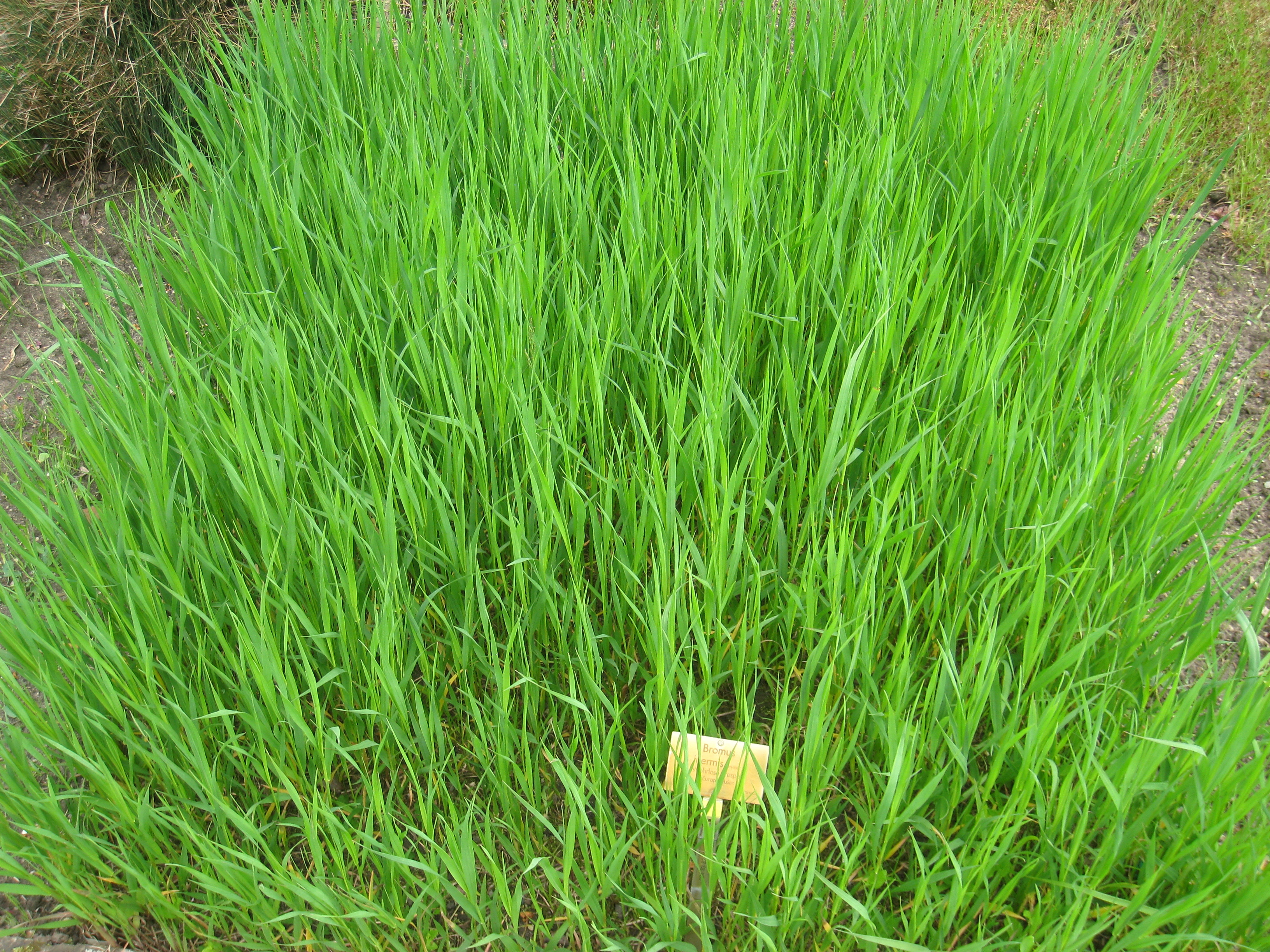 Bromus inermis specimen in the Botanischer Garten, Berlin-Dahlem (Berlin Botanical Garden), Berlin, Germany.